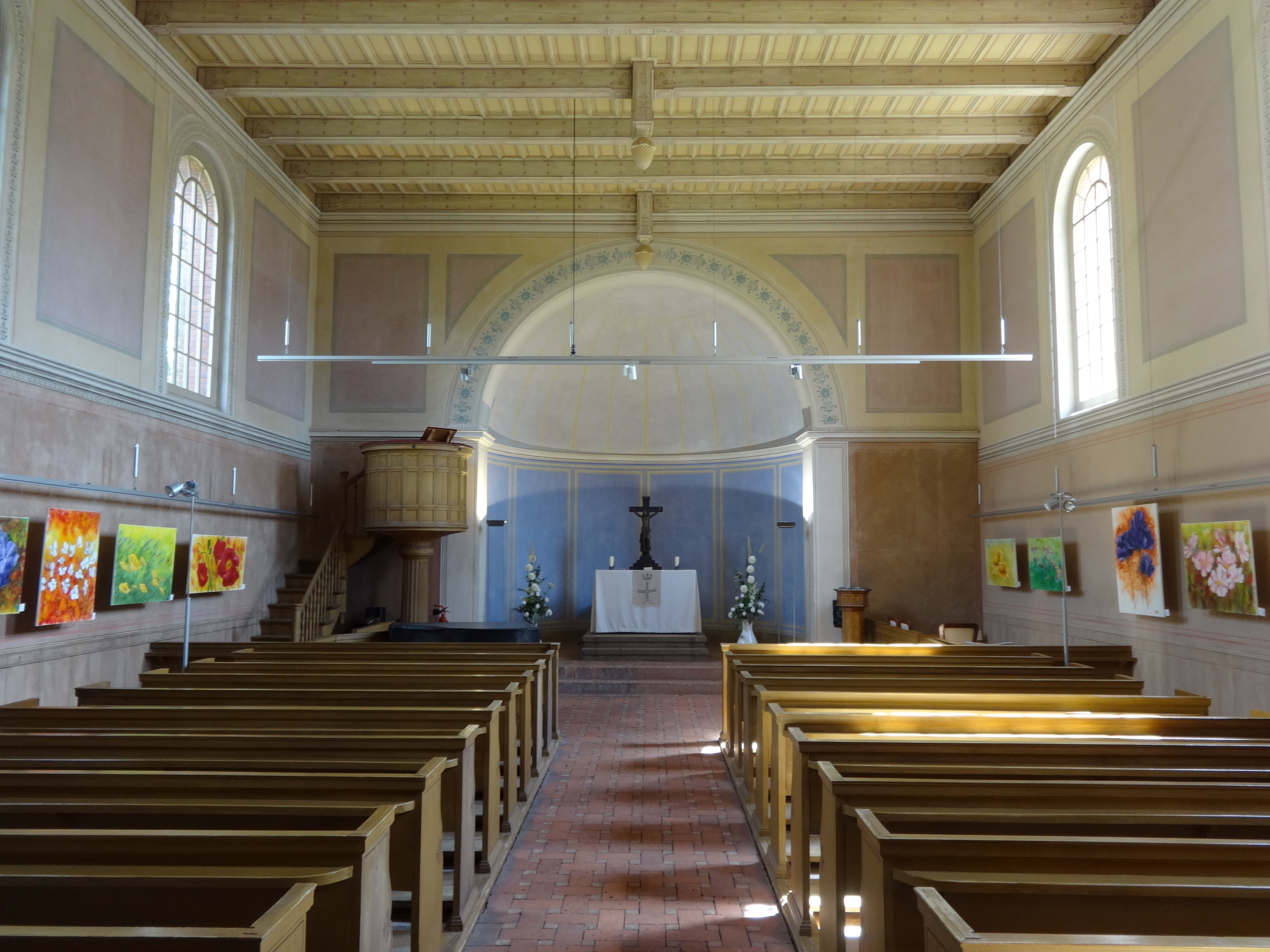 Die Dorfkirche Petzow ist ein ehemaliger, neuromanischer Sakralbau, der in den Jahren 1841 und 1842 nach einem Entwurf von Karl Friedrich Schinkel errichtet wurde. Nach seinen Entwürfen fertigten Handwerker auch den schlichten und hölzernen Altar mit einem Kruzifix aus Gußeisen, die Kanzel sowie eine Fünte aus Eichenholz an. 1988 entwidmet und für 99 Jahre an das Landratsamt verpachtet dient sie seit 1994 dem Landkreis als Veranstaltungsort für Konzerte, Ausstellungen sowie als Standesamt.